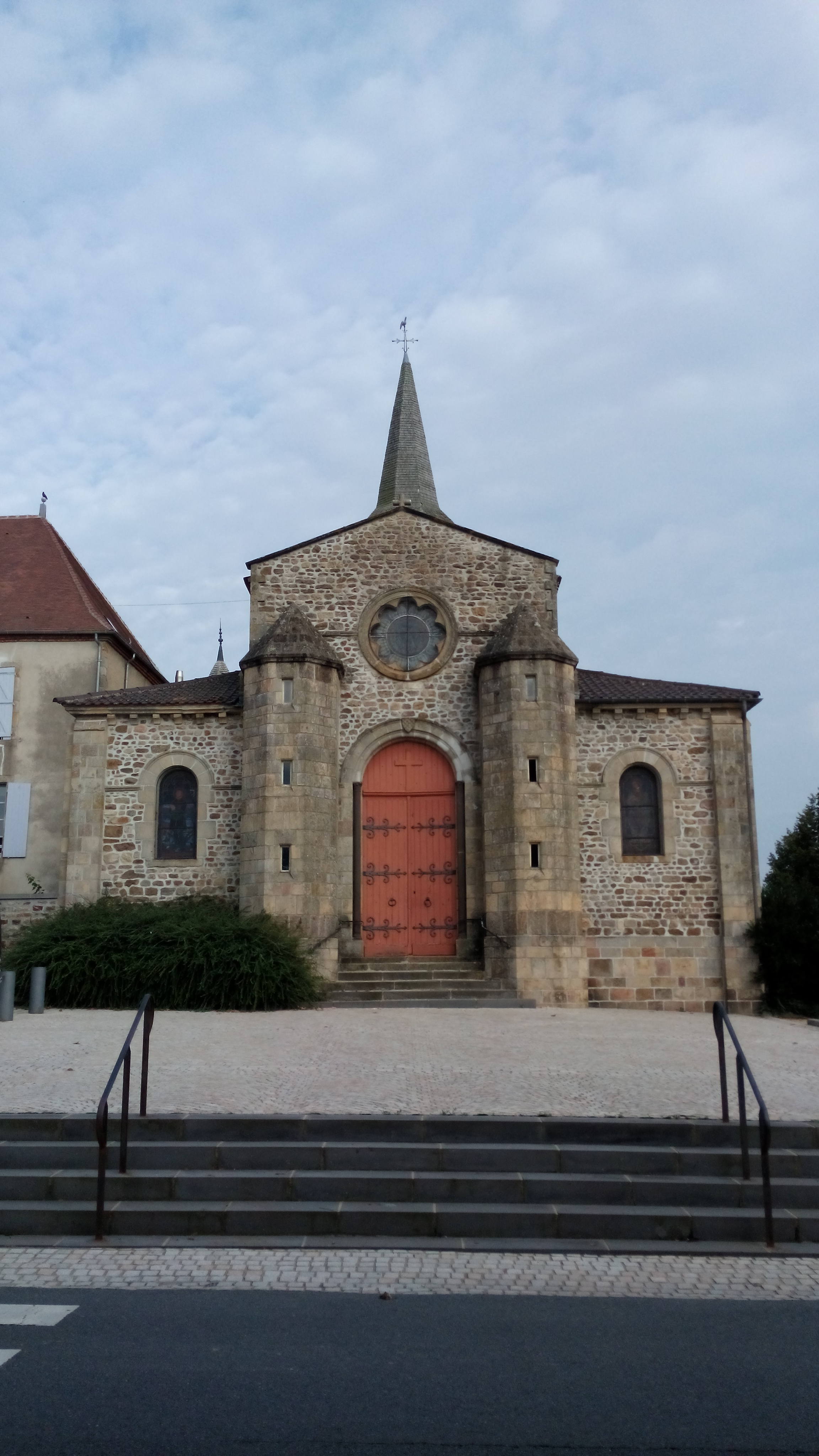 Église Notre-Dame de Marcillat en Combraille Vue de la rue de l'Abbé Peynot .